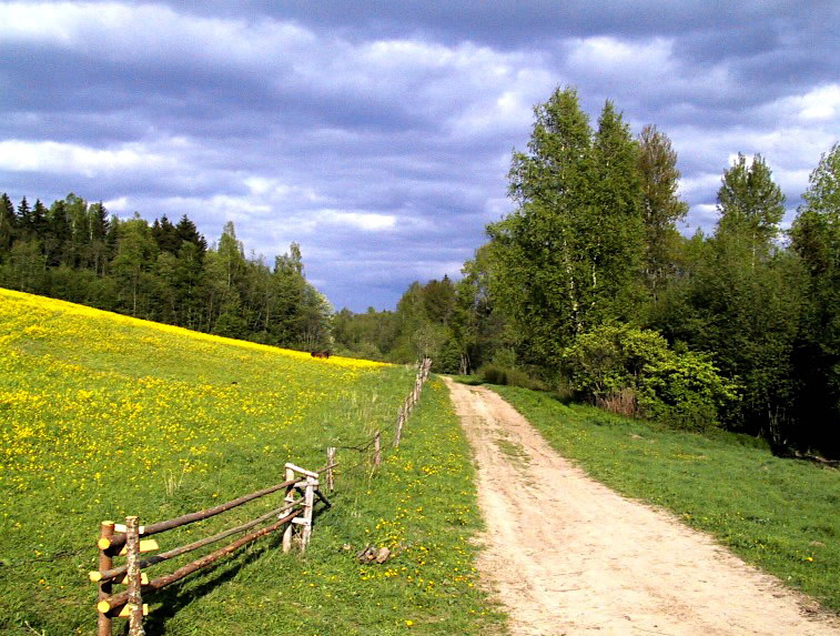 Ainava pie Dēliņkalna